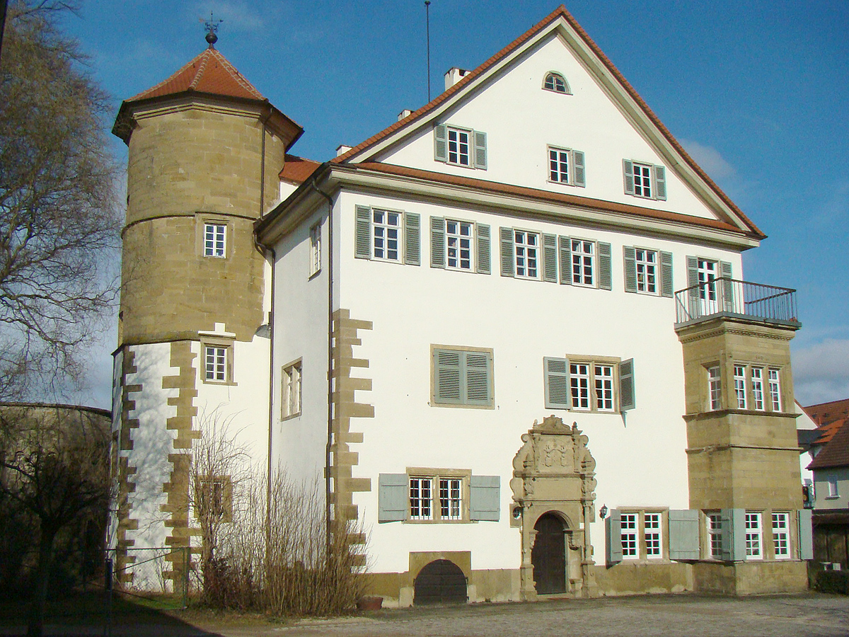 Unterschloss in Gemmingen